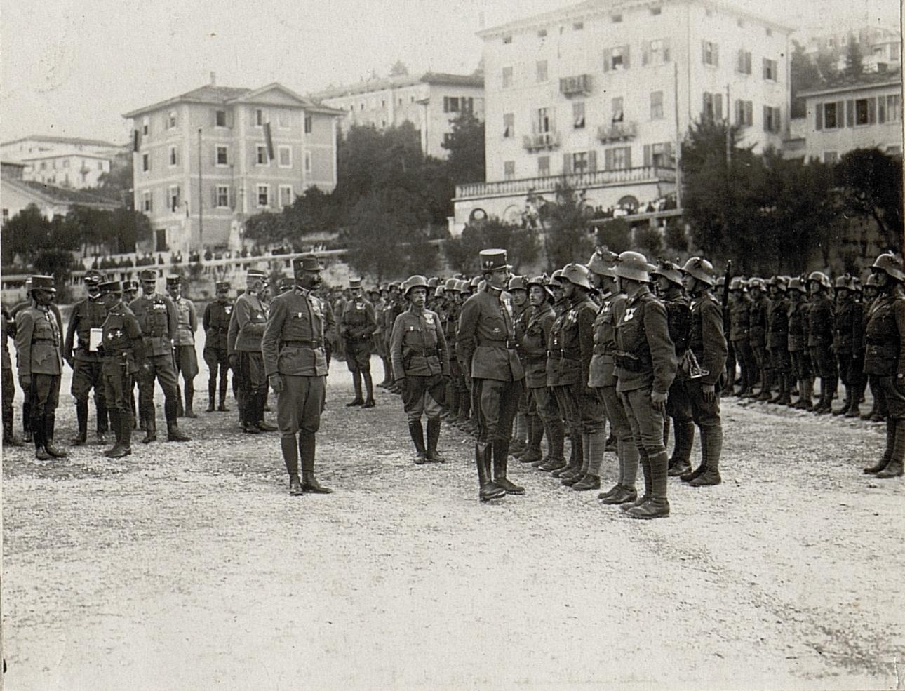 Parade des Infanterieregiments No. 59 vor Kaiser Karl in Trient